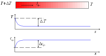 A Seebeck-effektus értelmezés. A termoelem szócikkhez a 2. ábra